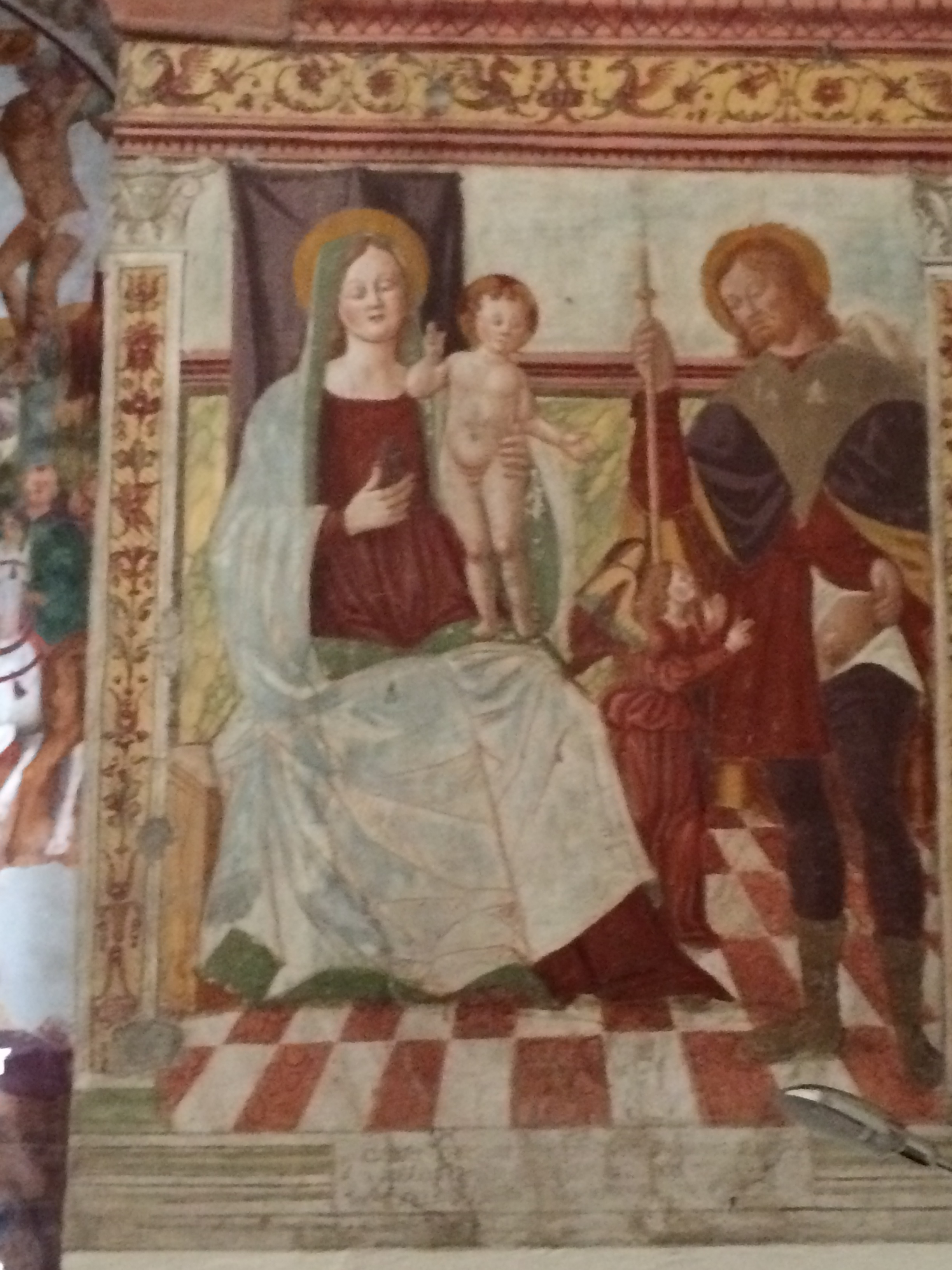 Chiesa di San Leonardo (Provesano)